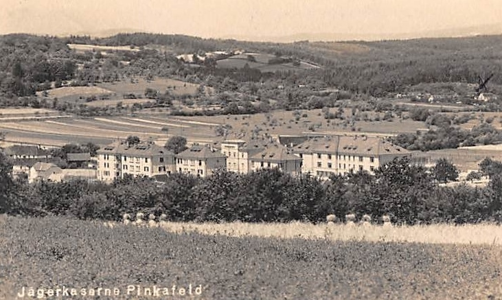 Jägerkaserne